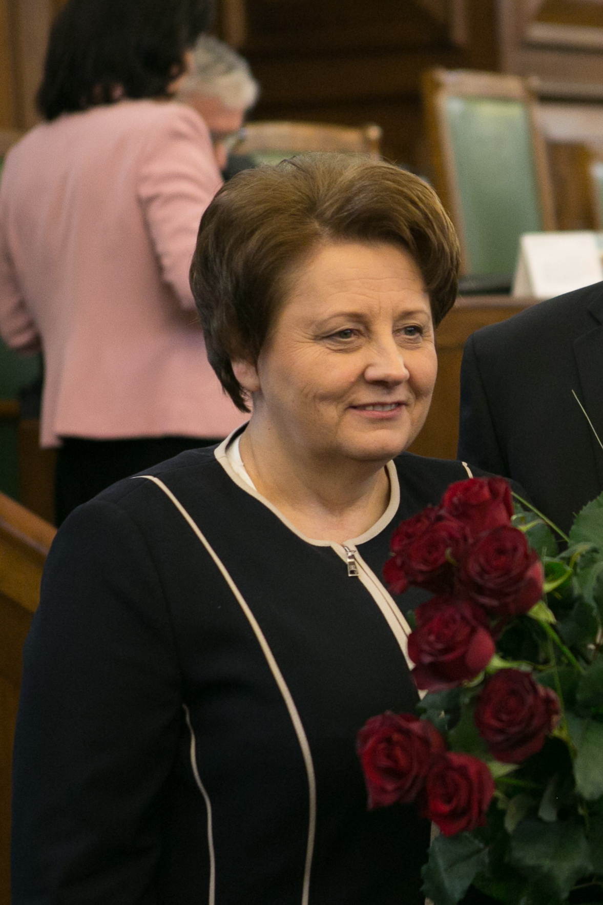 Straujuma un Dombrovskis